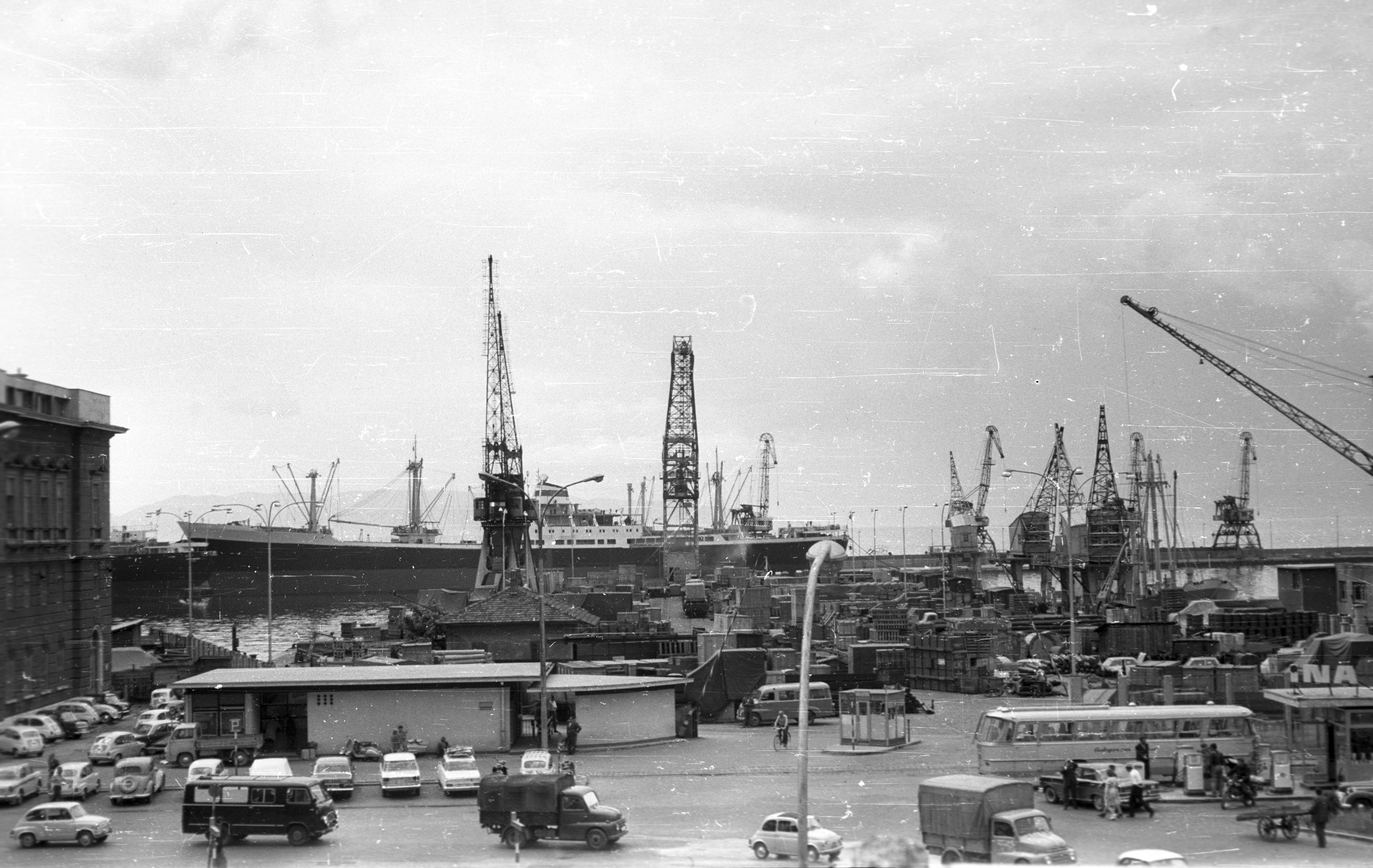 kikötő. Location: Croatia, Rijeka Tags: Yugoslavia, port, crane, ship Title: kikötő.